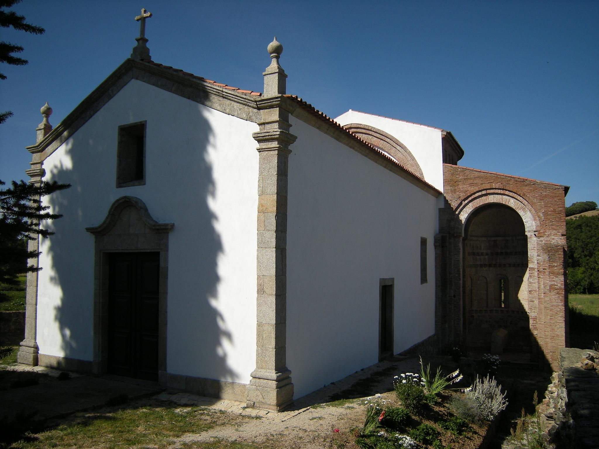 Iglesia de São Bento de Castro de Avelãs, Bragança, Portugal